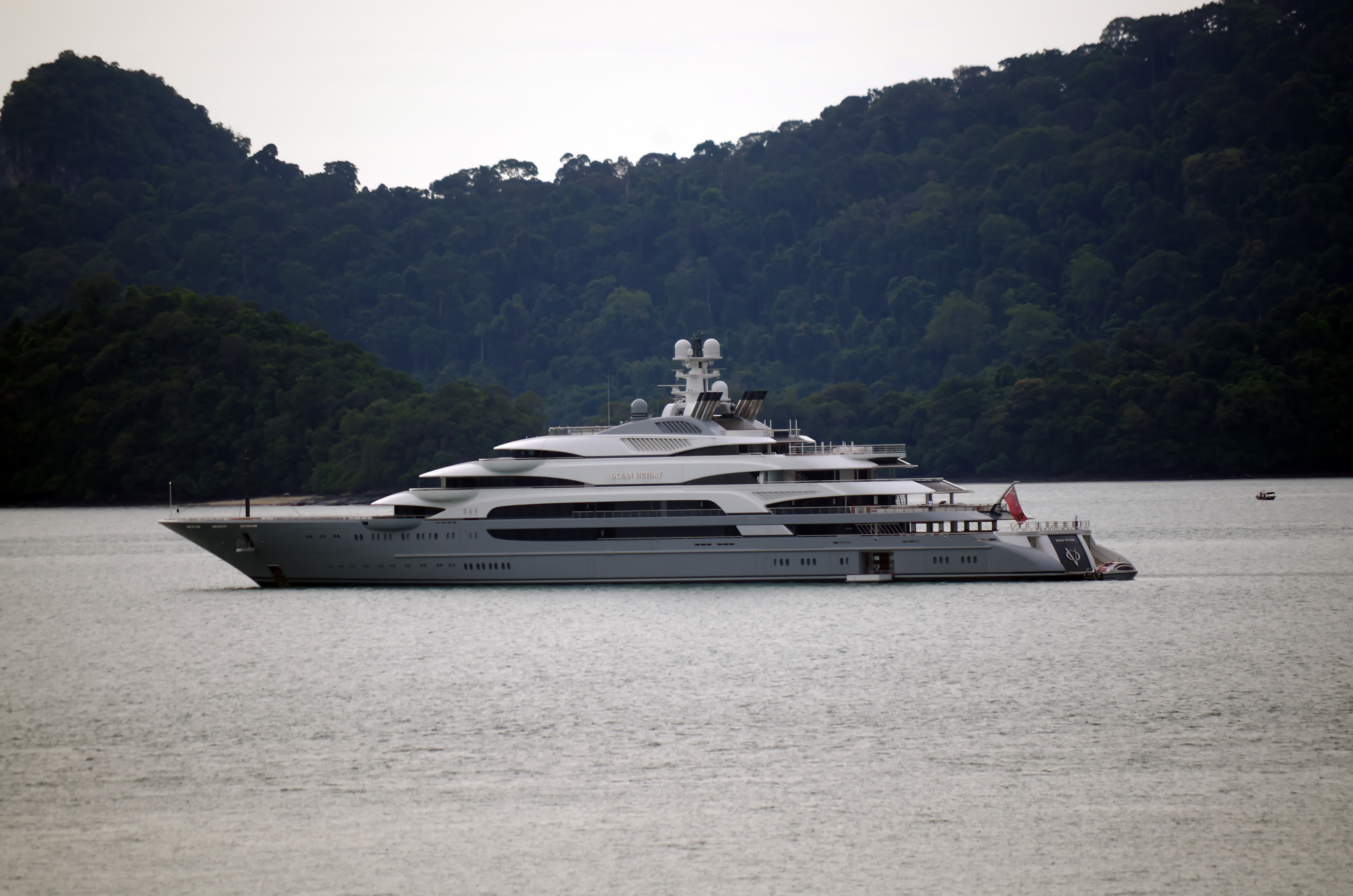 Yacht Ocean Victory nahe Awana Pier, Langkawi